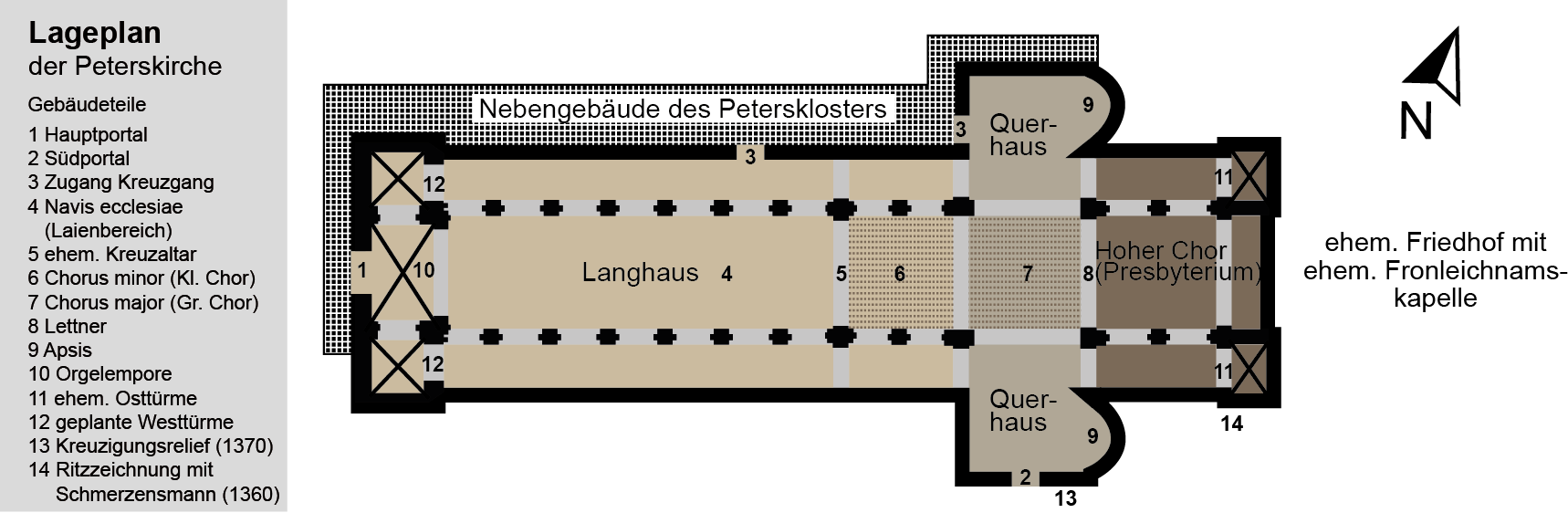 Grundriss der Peterskirche in Erfurt